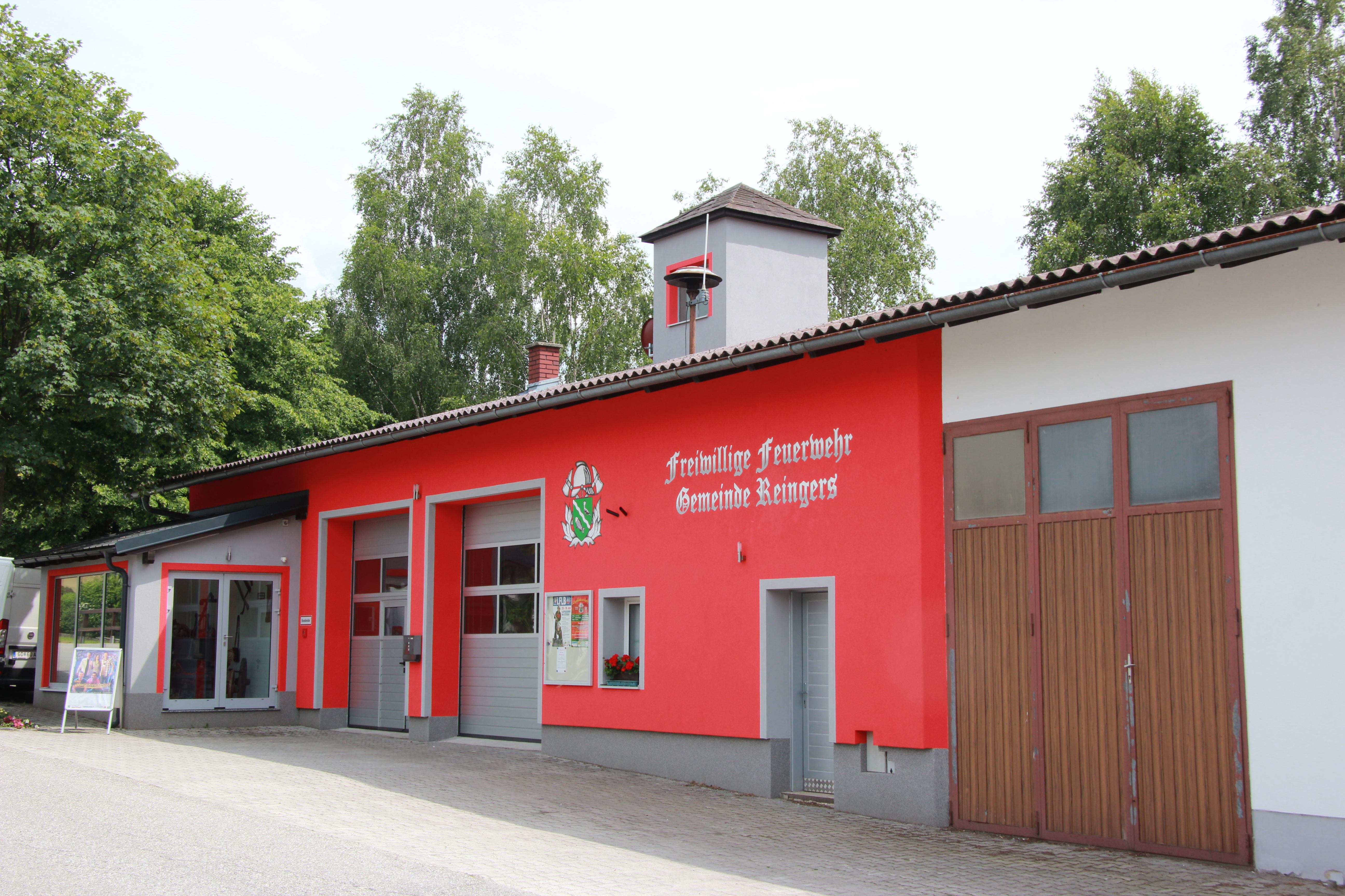 Reingers im niederösterreichischen Waldviertel